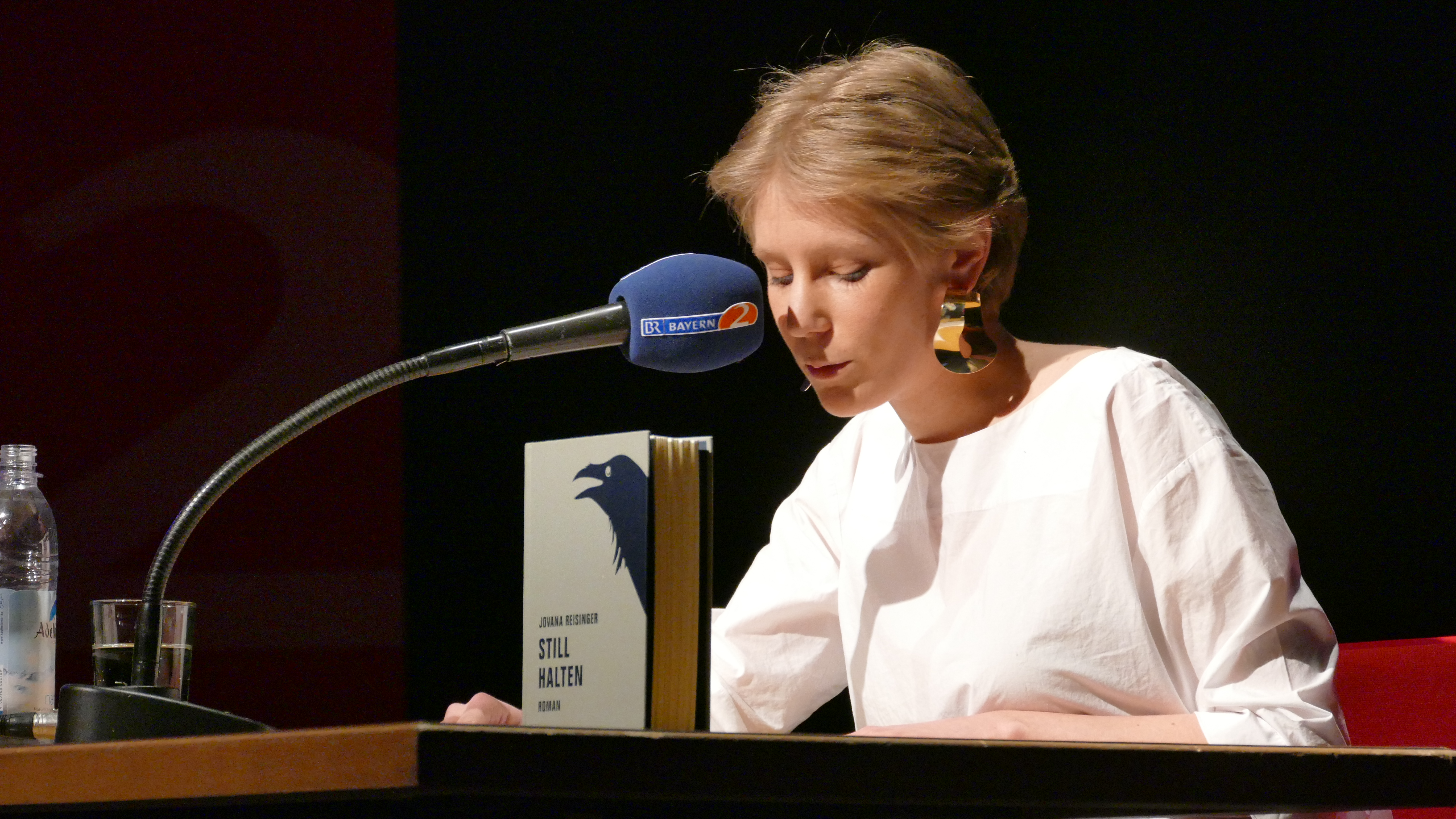 die Schriftstellerin Jovana Reisinger bei den Wortspielen 2018 in München. Lesung ihres Romans "Still halten".